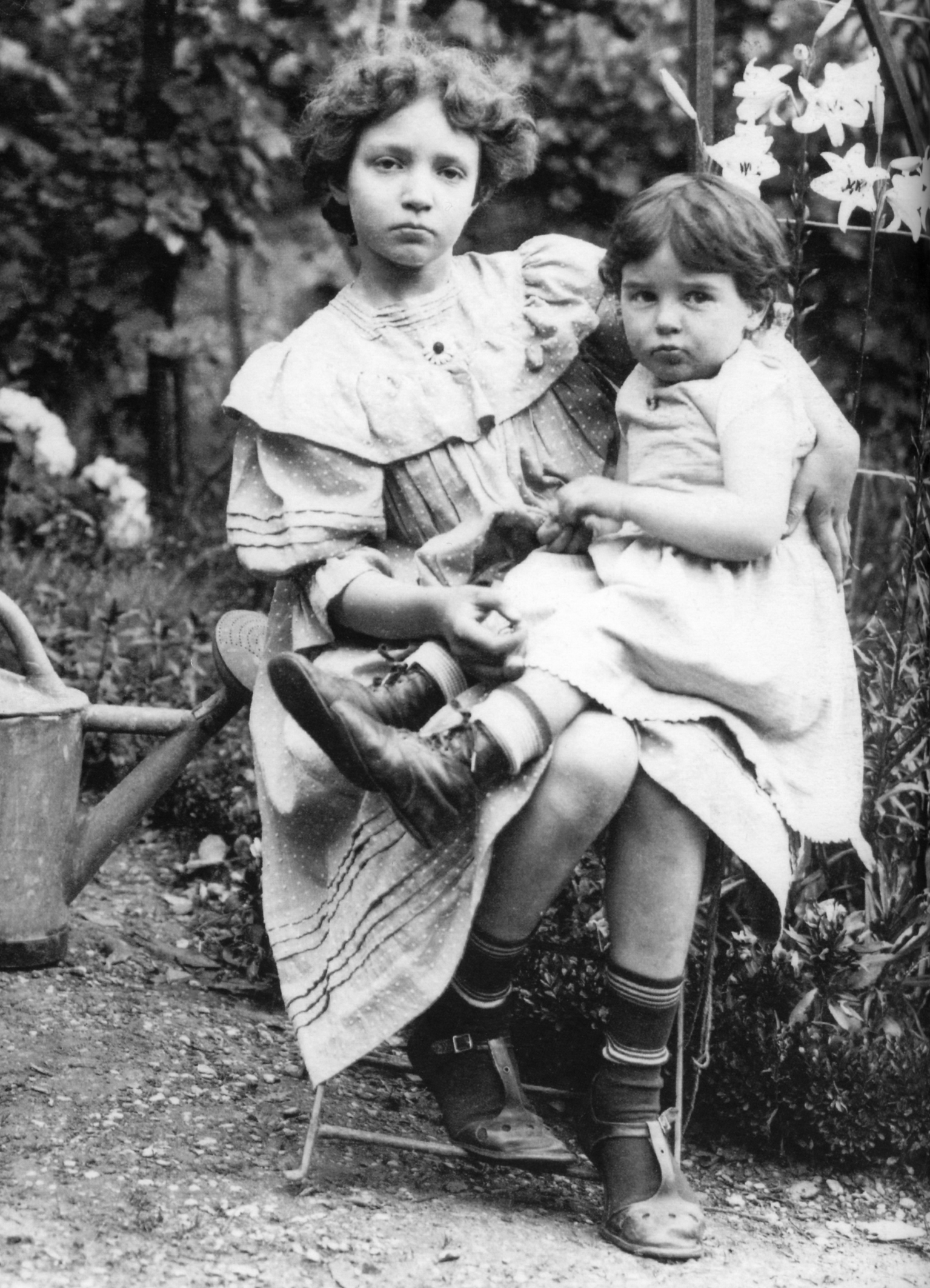 Irene i Eve Curie (1908)